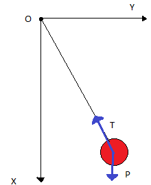 schéma d'un pendule pesant simple